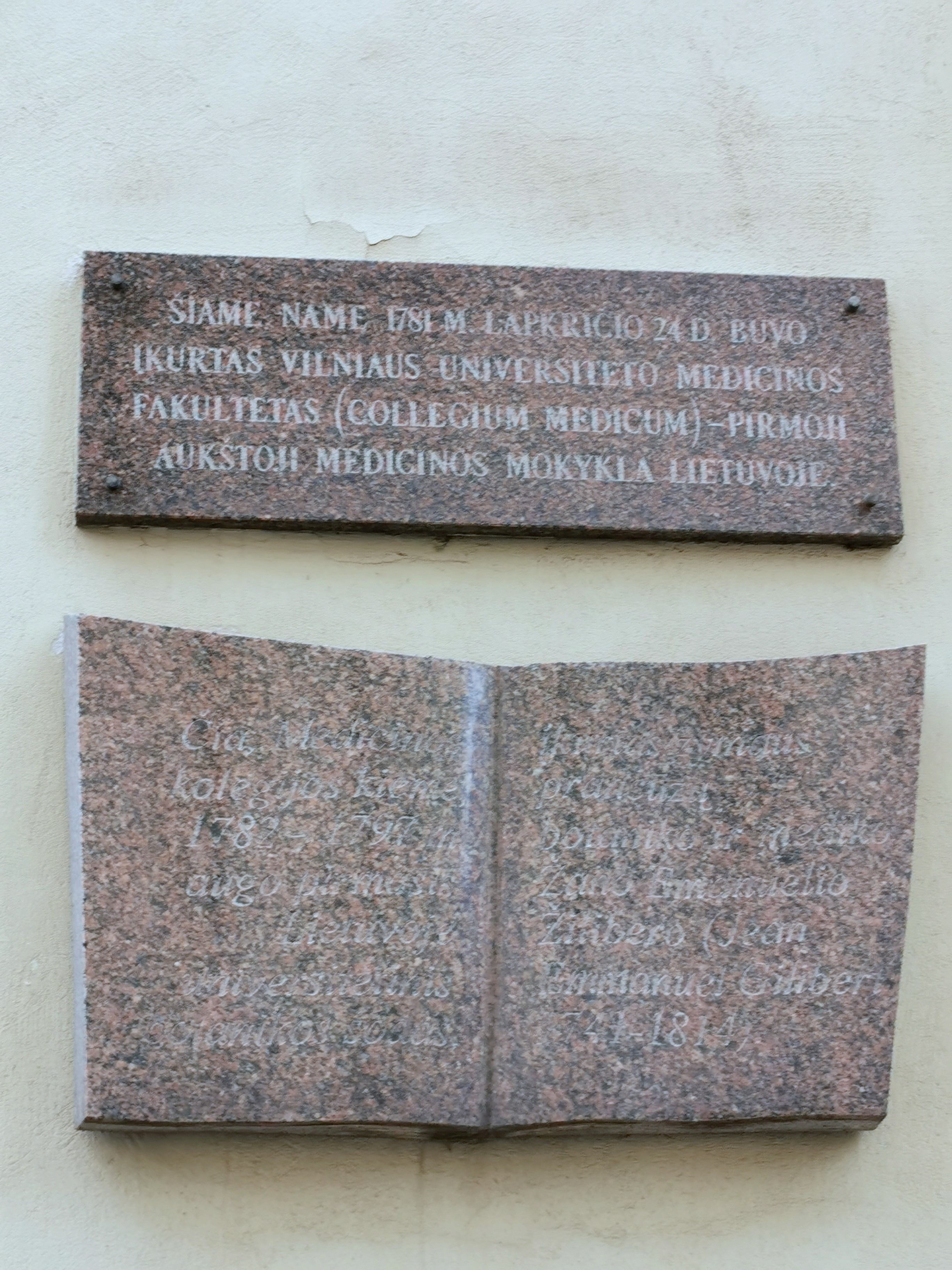 Name nr. 22 buvo įsikūrusi Medicinos kolegija, vėliau – Medicinos-chirurgijos akademija, veikusi iki 1842 m.